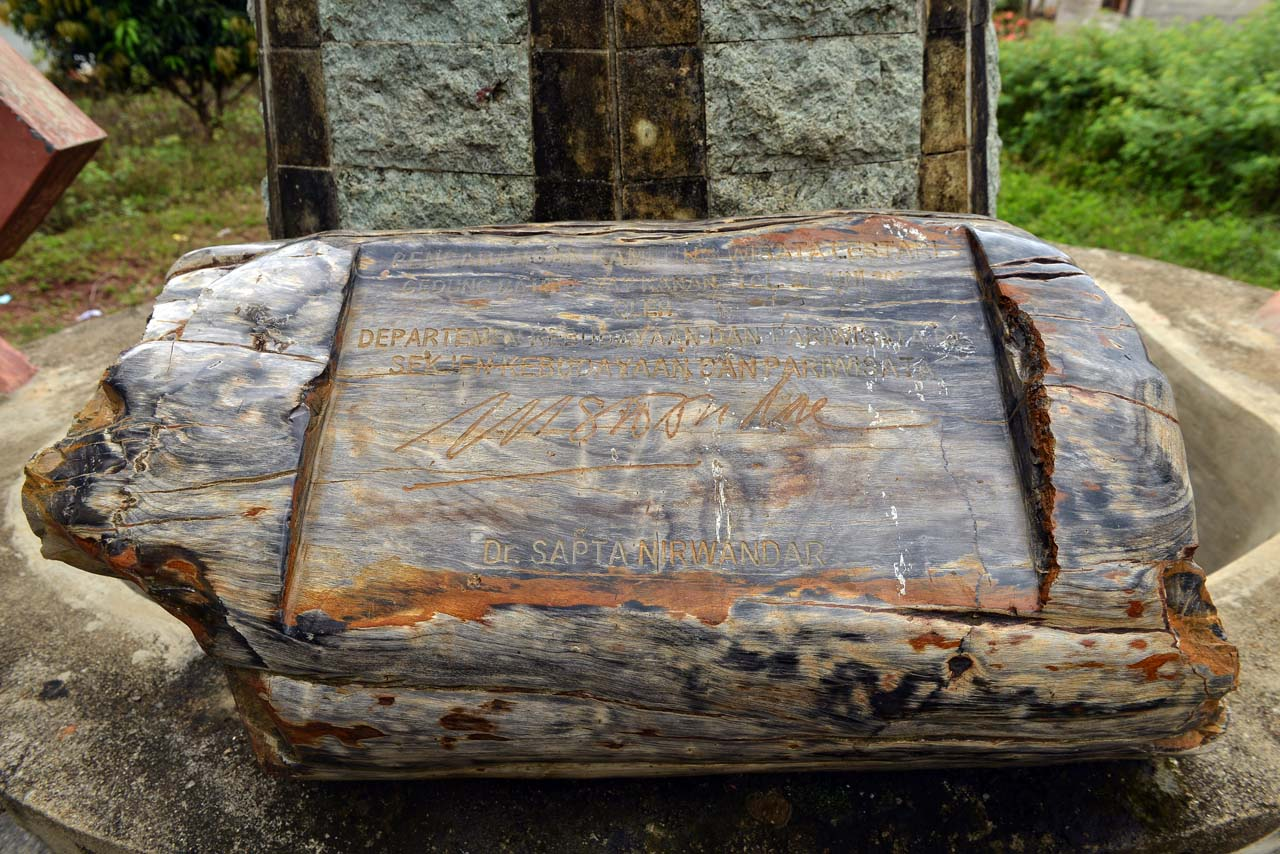 Prasasti terbuat dari fosil kayu yang sudah membatu, ditandatangani oleh Sekjen Kebudayaan dan Pariwisata di tahun 2007 itu, Dr. Sapta Nirwandar.